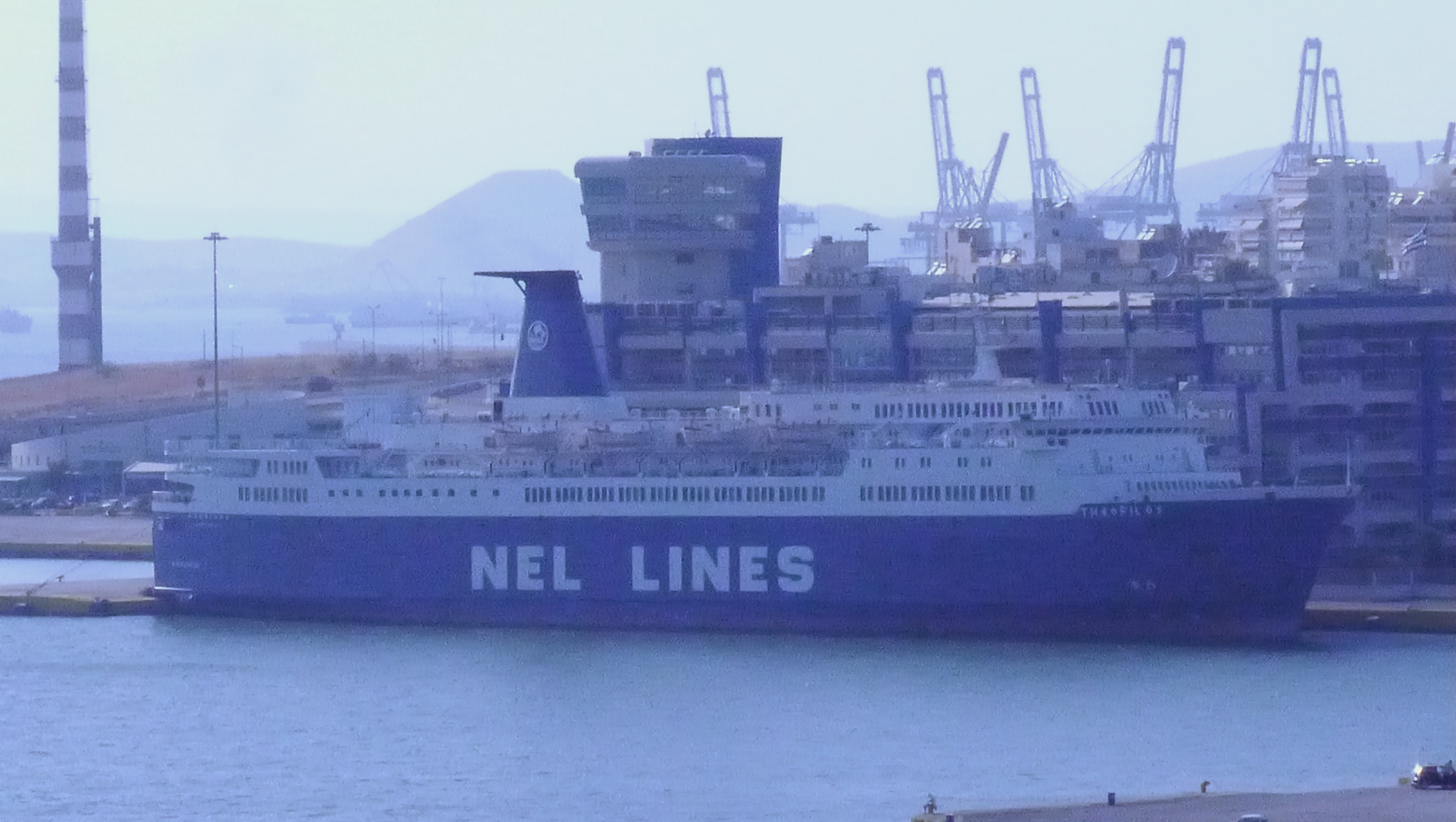 MS Theofilos in Heraklion / Greece IMO Number: 7362108 MMSI Number: 239369000 Callsign: SWJC Length: 149 m Beam: 24 m